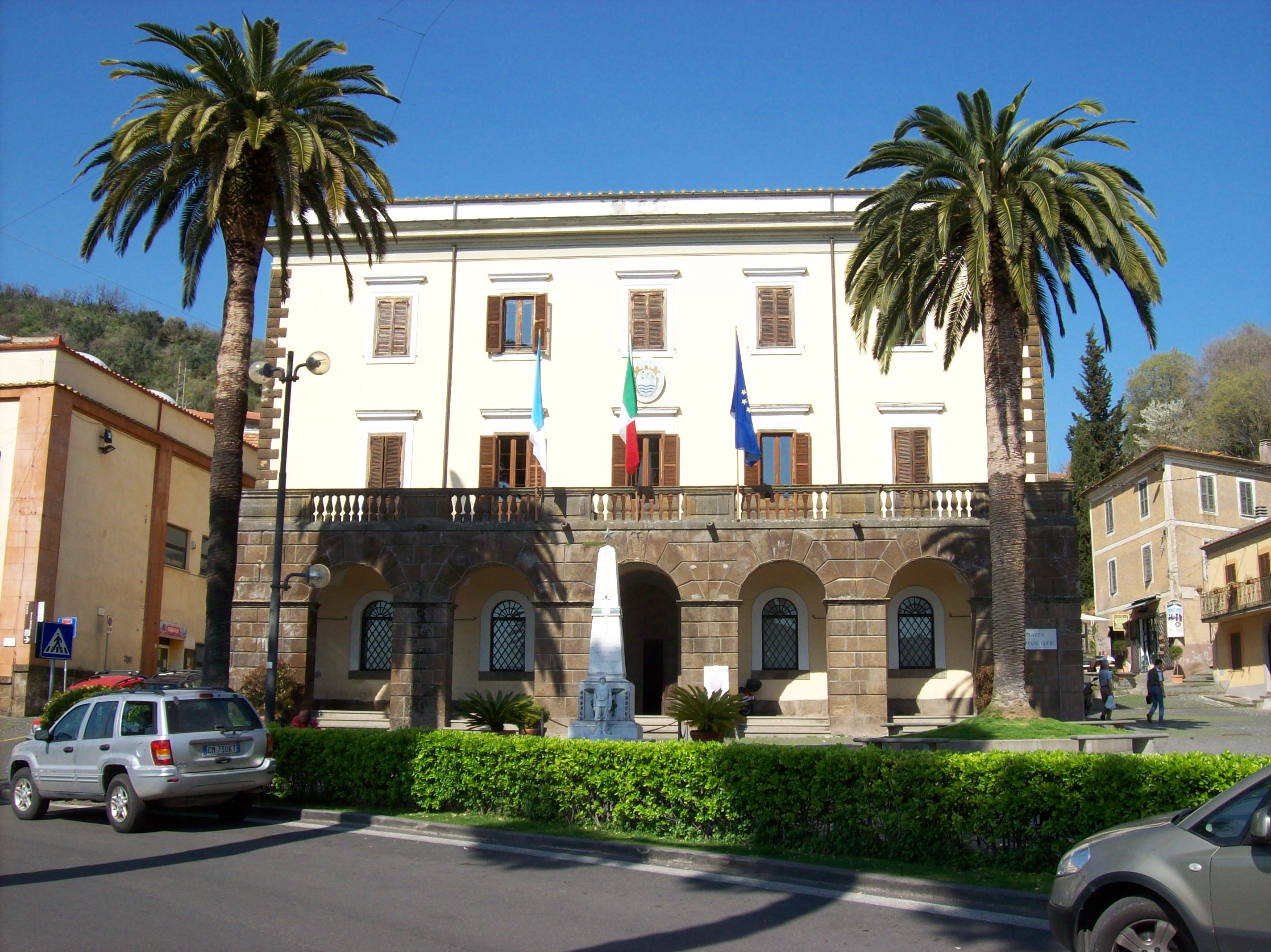 Palazzo del Comune e Museo Civico di Trevignano Romano (Roma), Italia